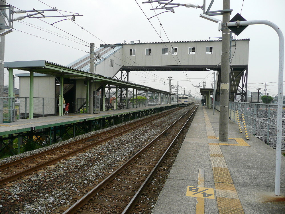 日豊本線南行橋駅・ホーム 投稿者↑PON（ウエポン）が2007年5月5日に撮影 一部編集の上で2007年5月12日にアップロード